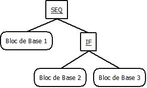 Arbre syntaxique simple